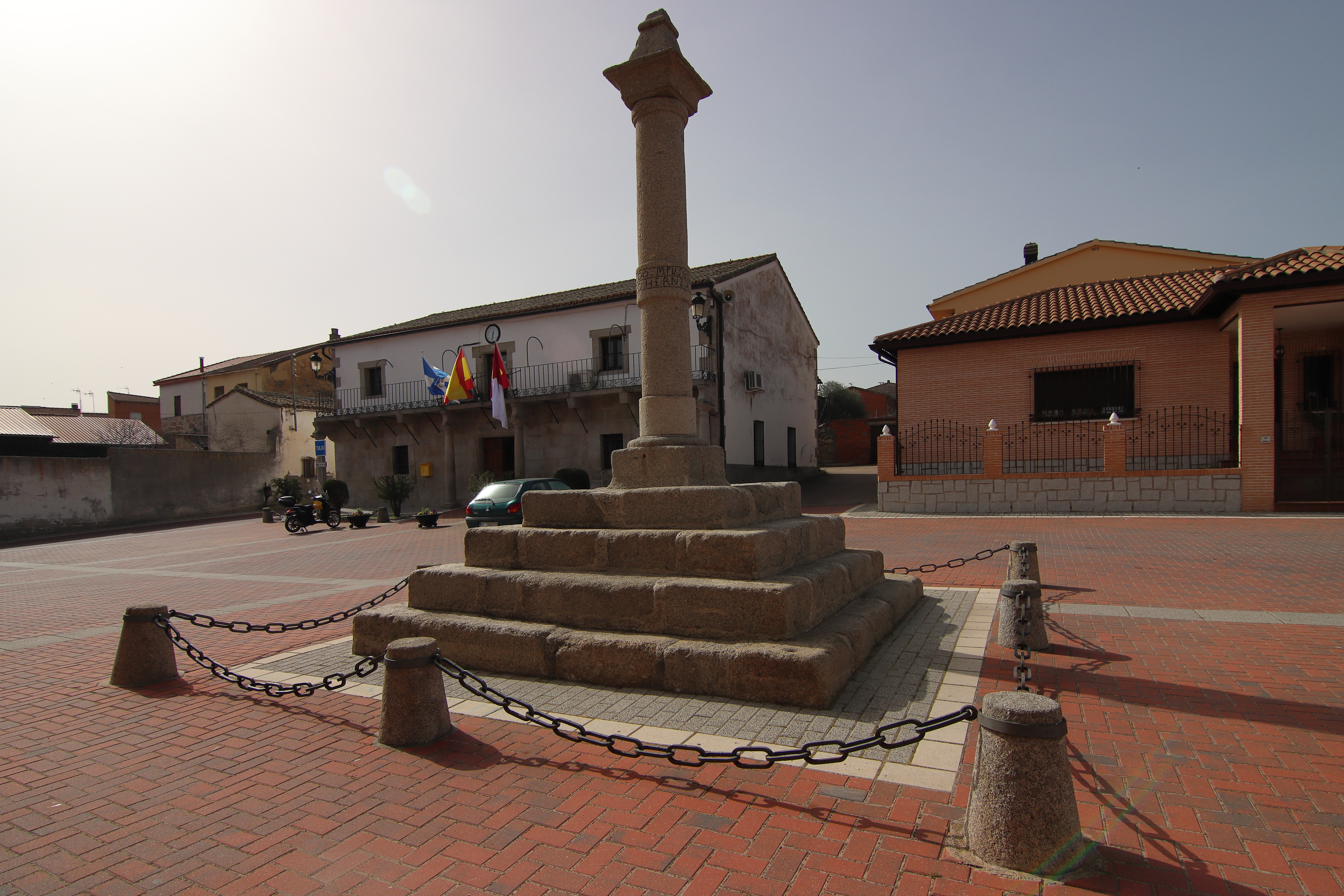 Picota o rollo en plaza de Paredes de Escalona